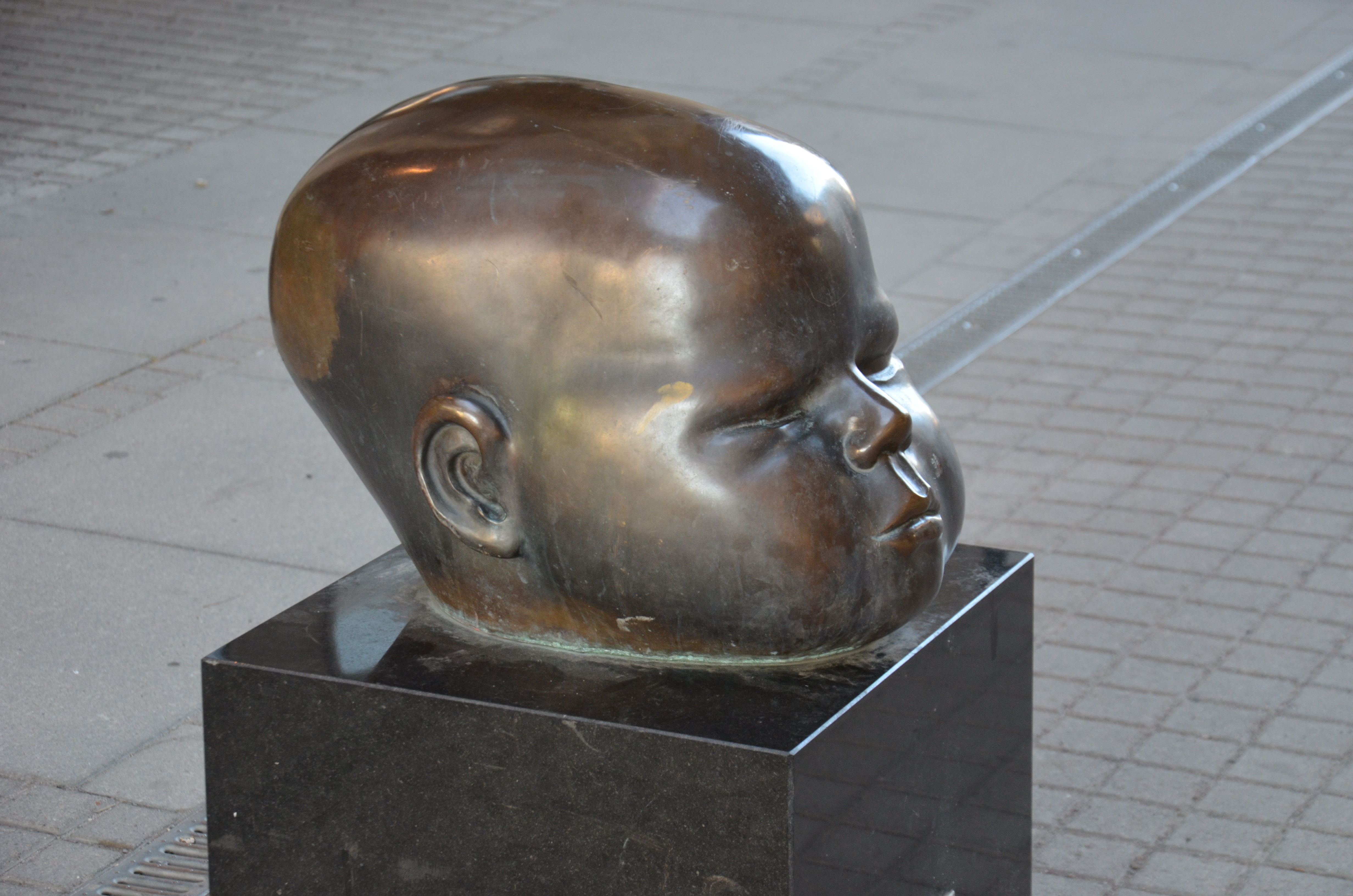 Barnhuvud av Hertha Hillfon, Årstadal/Marievik i Stockholm